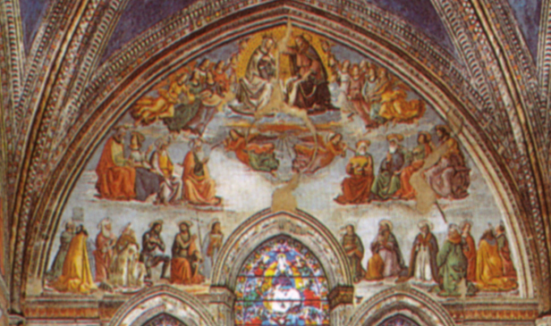 Cappela tornabuoni, incoronazione della vergine